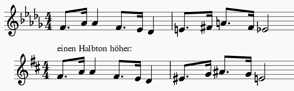 Transposition um einen Halbton nach oben